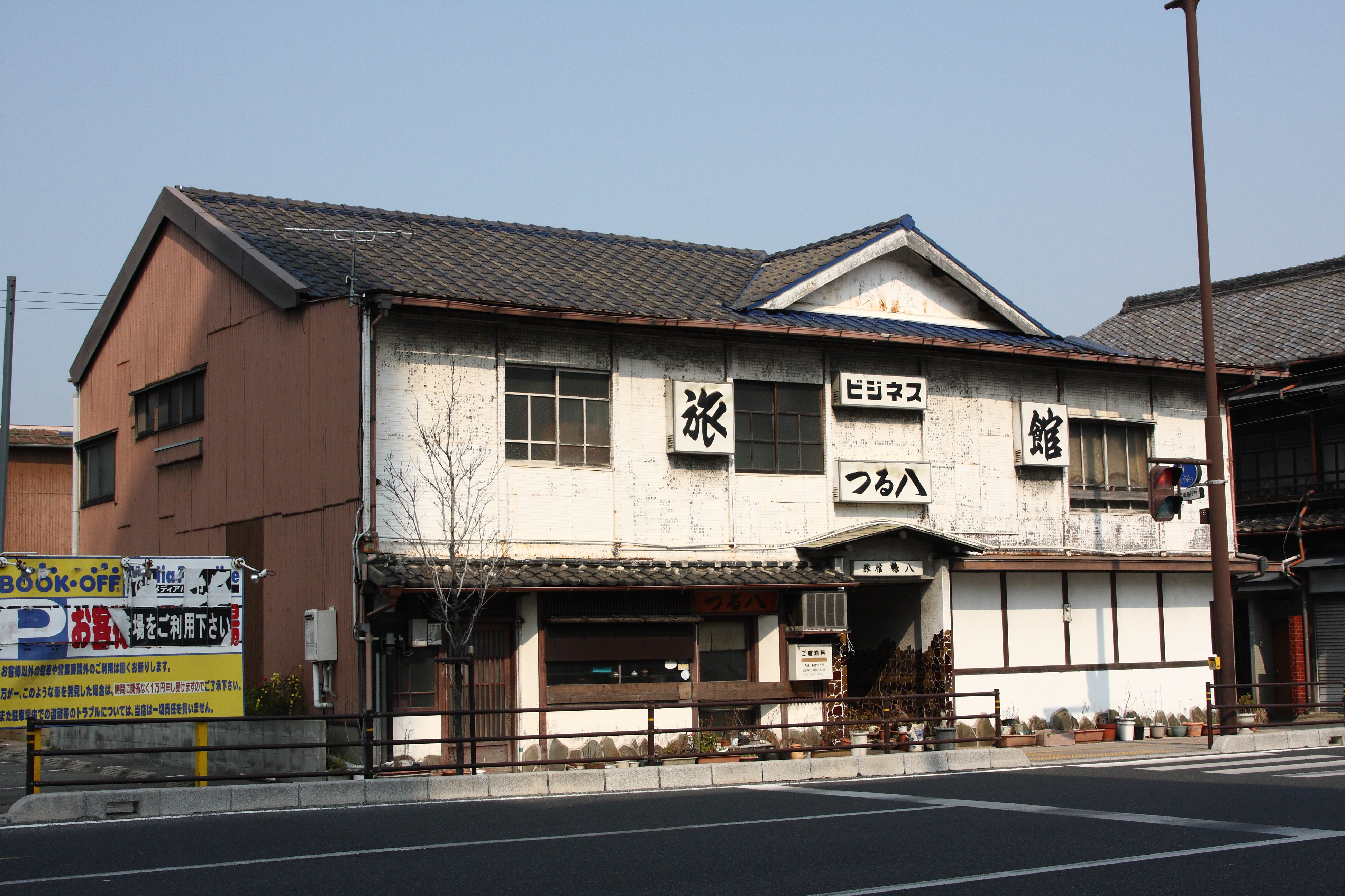 山口県下関市新地西町 大正時代の建物（元遊郭） 現.食堂 Canon EOS 40D